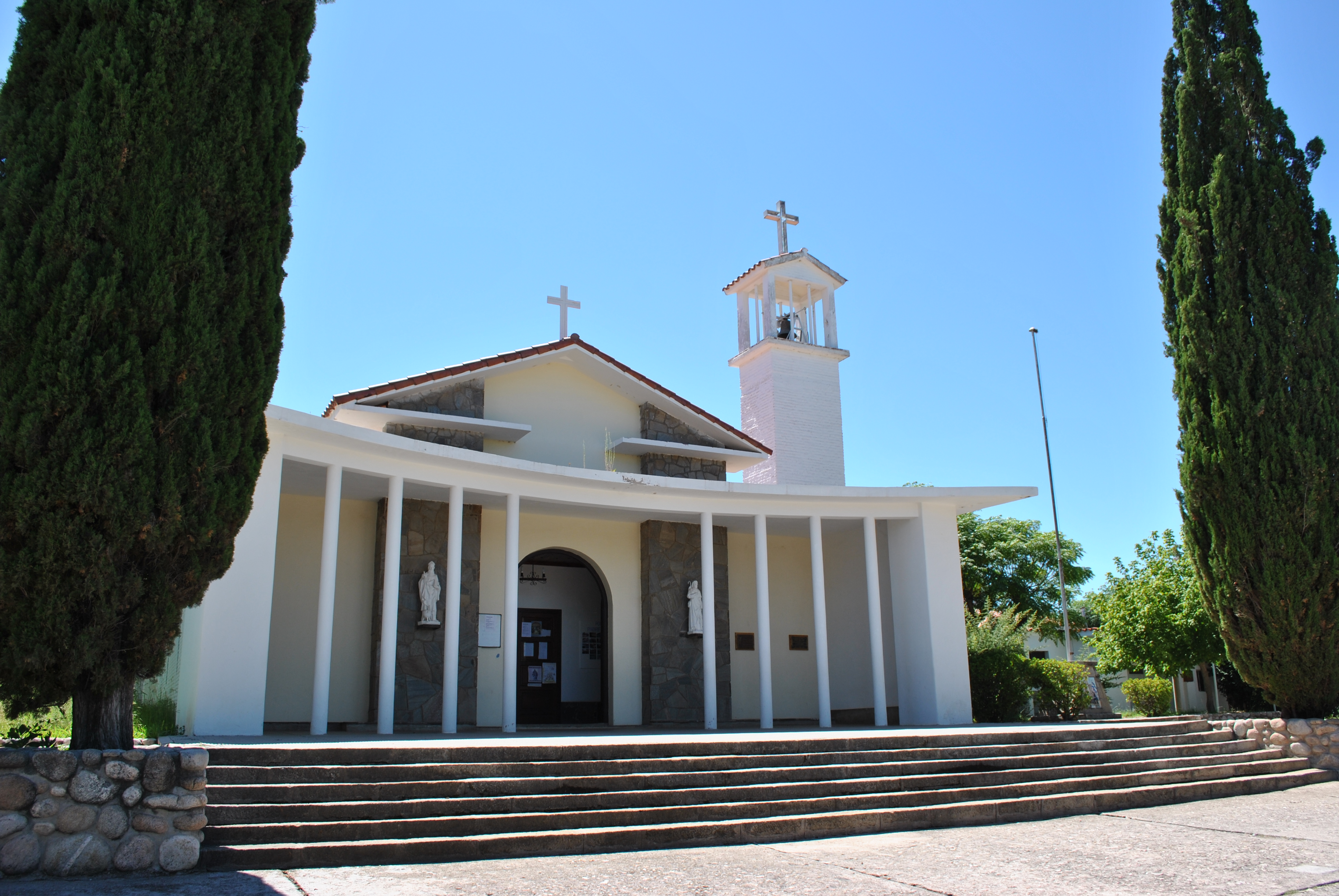 Iglesia Nuestra Señora del Perpetuo Socorro - Mina Clavero, Departamento de San Alberto, Córdoba. El 10 de Noviembre de 2008 tuvo sus bodas de oro. Posee hermosos vitrales que ilustran los sacramentos.